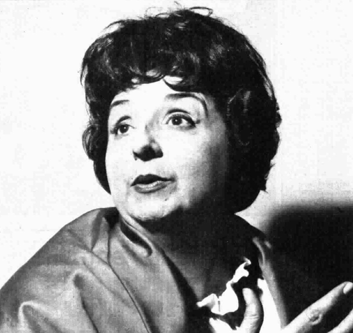 Italian actress Giusi Raspani Dandolo